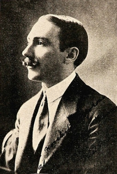 "Eduardo Barrios, autor de la comedia en tres actos "lo que niega la vida" que estrenará mañana la Compañia Adams." Revista Sucesos de 1914.